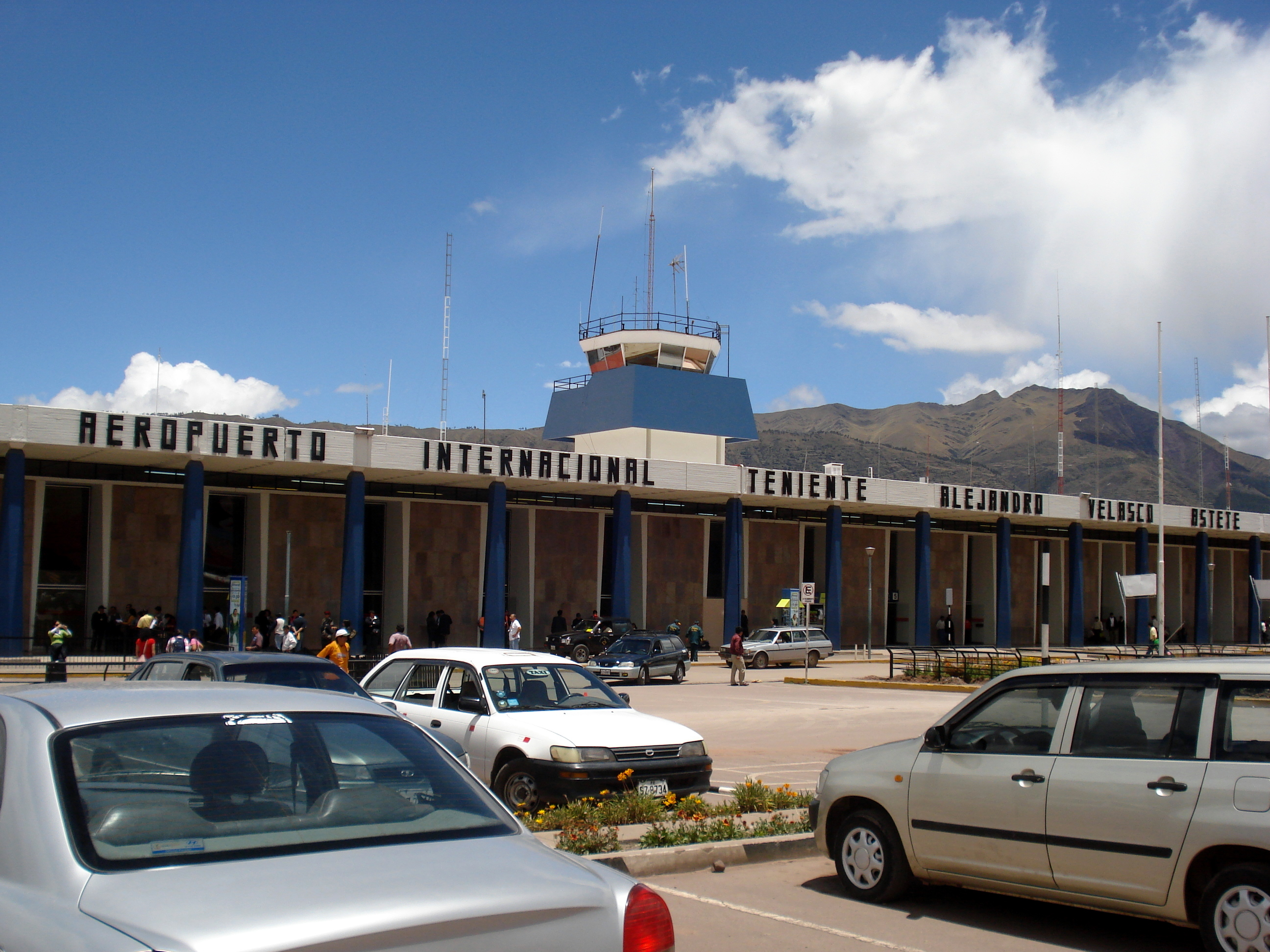 Cusco, Perú.